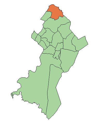 Ubicación de Limpio.